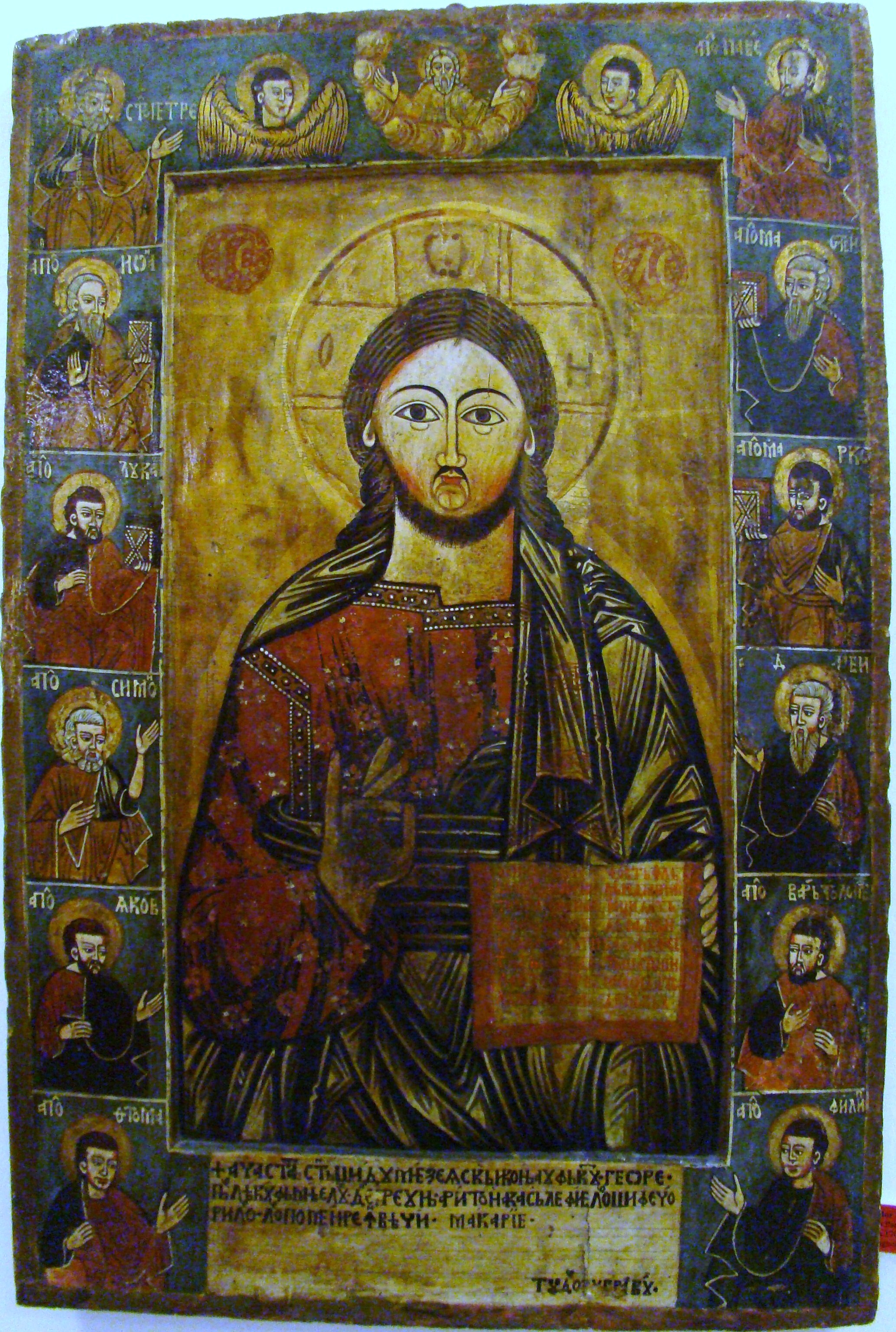 Isus Pantocrator (Toader Zugrav, cca 1700)